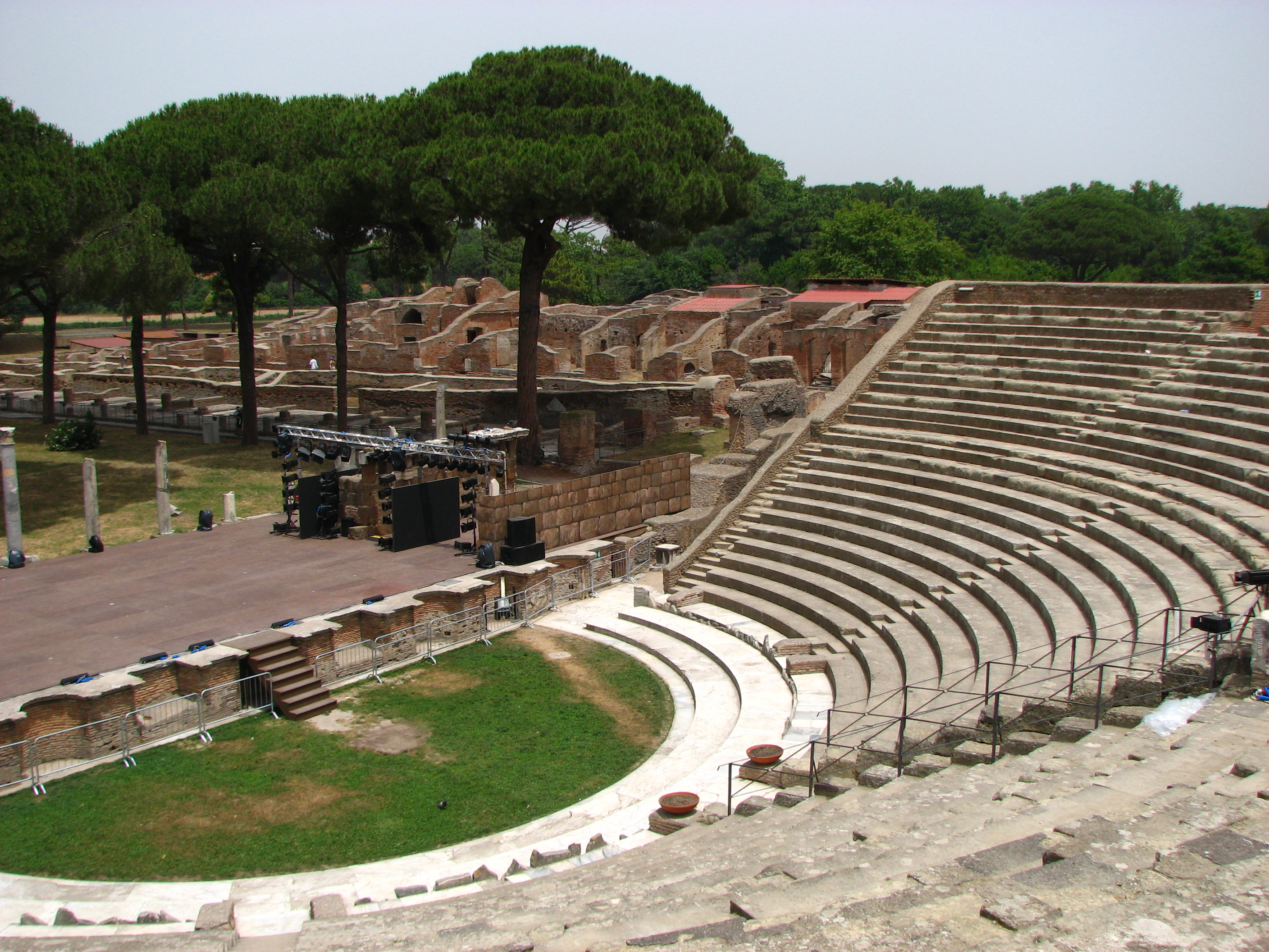 Ostia Antica, Roma, ItaliaIMG_1296 Ostia Antica